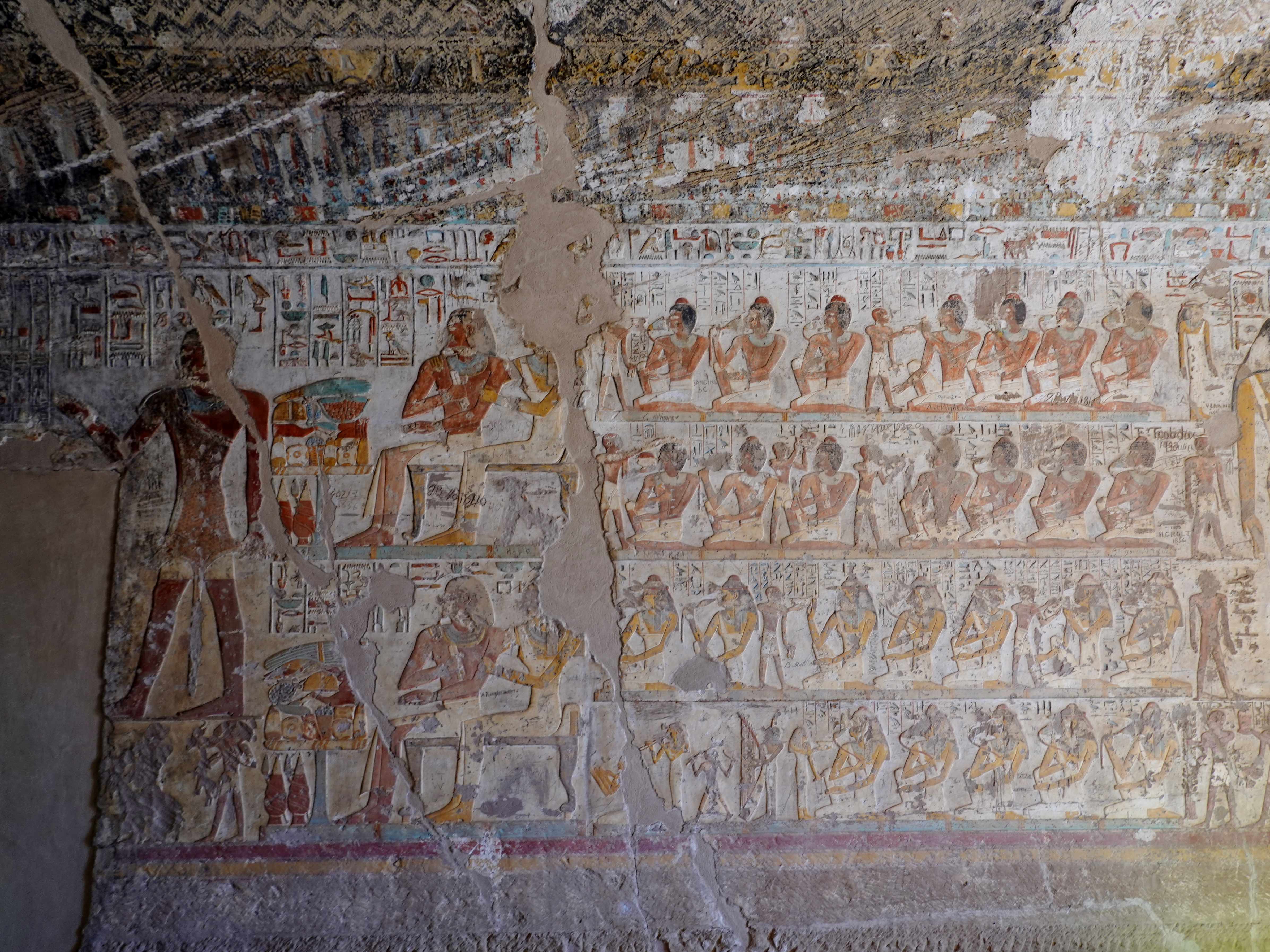 Felsengrab des Paheri unter den Felsengräbern des altägyptischen Necheb bei el-Kab, Ägypten